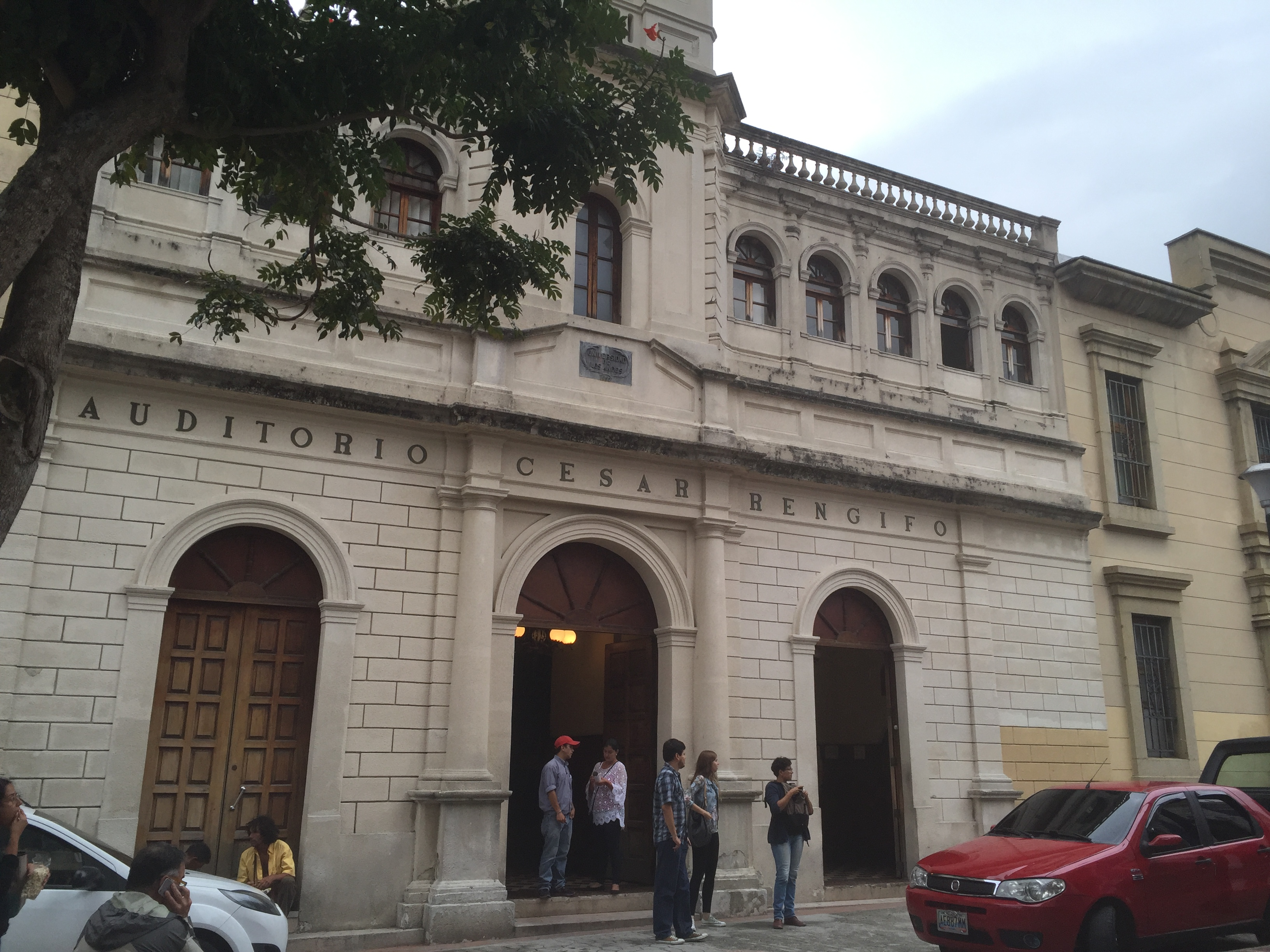 Auditorio César Rengifo de la Universidad de Los Andes, Mérida, Venezuela.